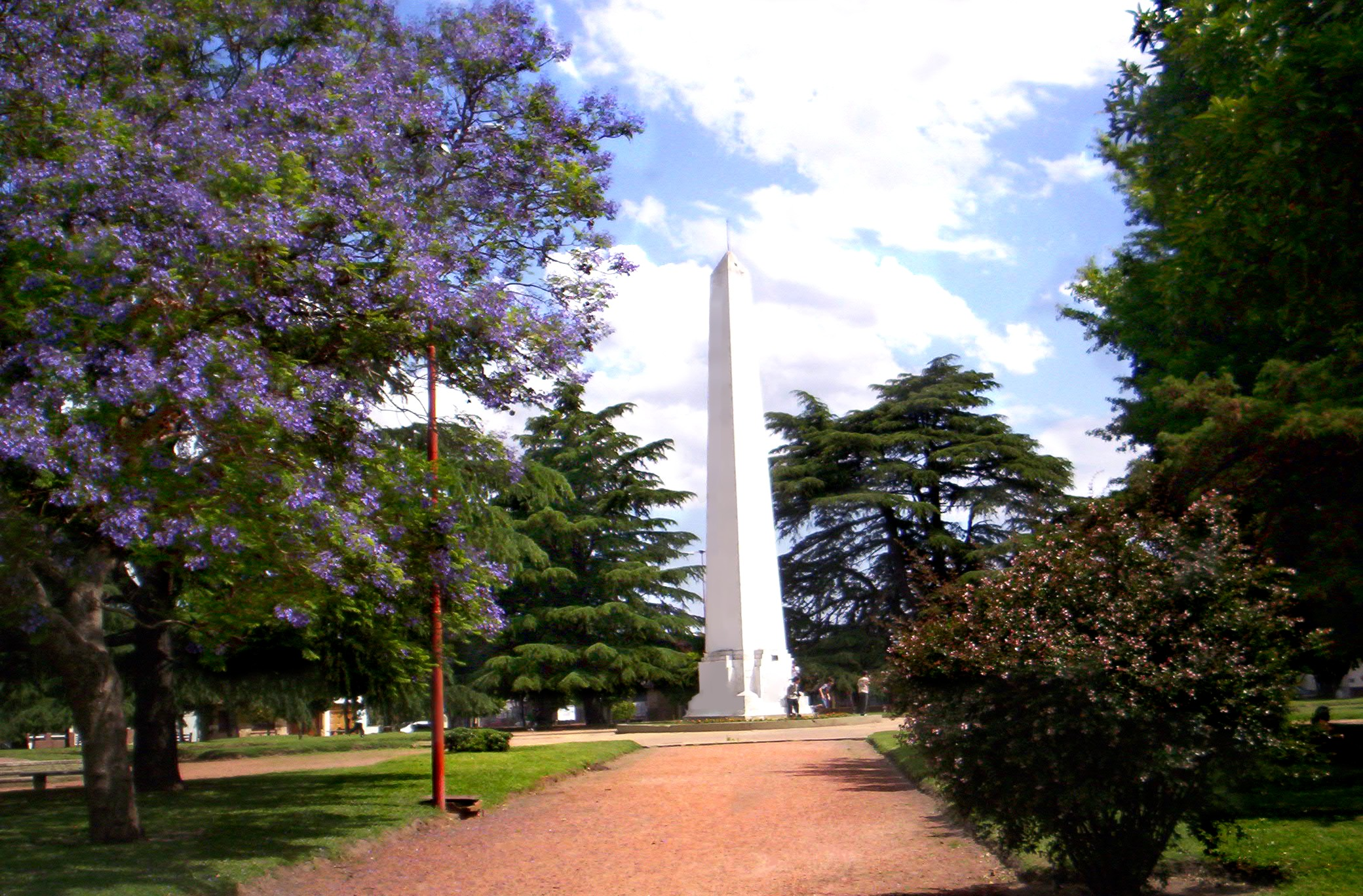 Plaza 9 de Julio, en Junín, Argentina. En el centro se aprecia el obelisco construído en 1938.